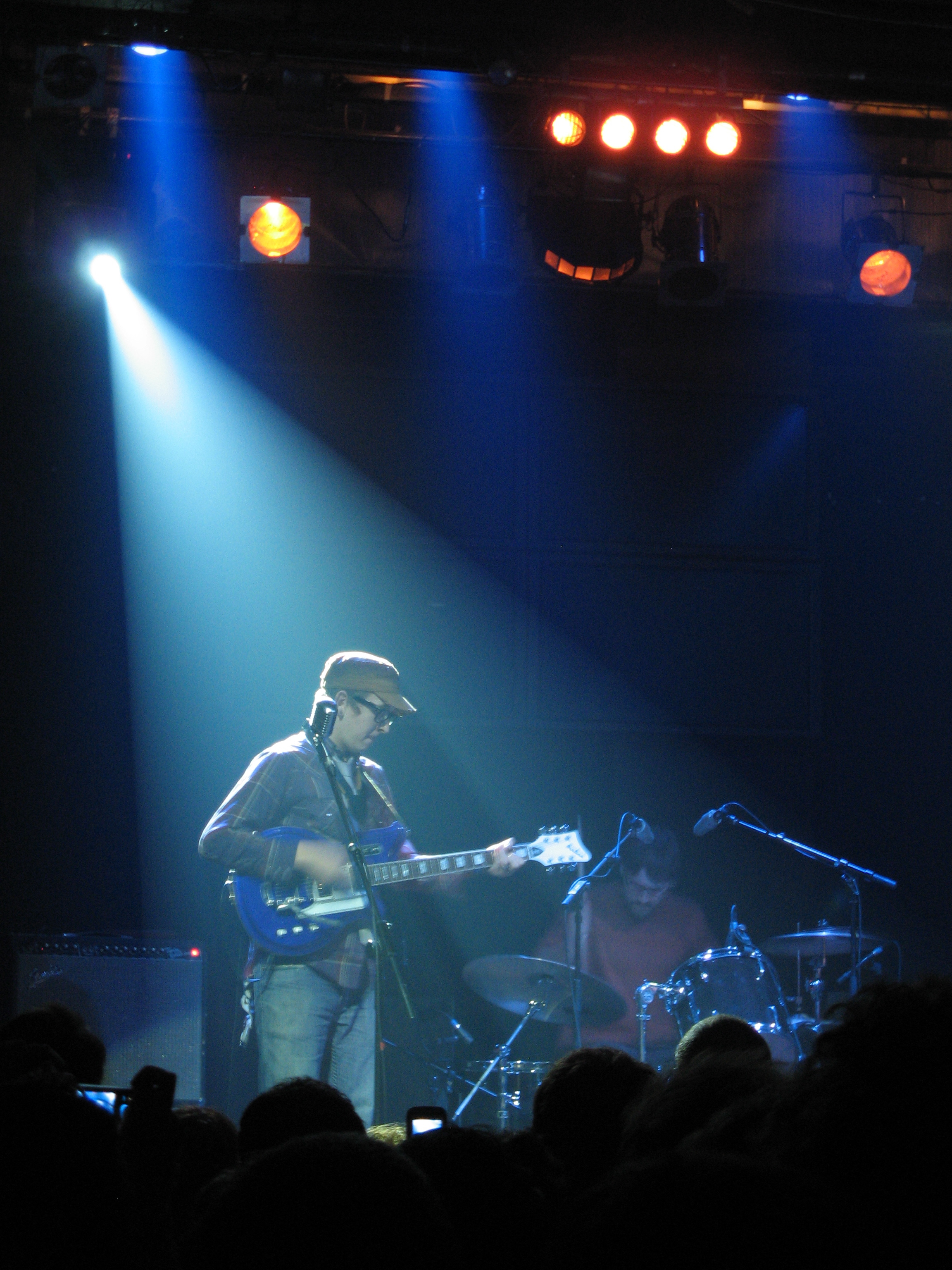 Micah P. Hinson en un concierto en Madrid, España. 2008.